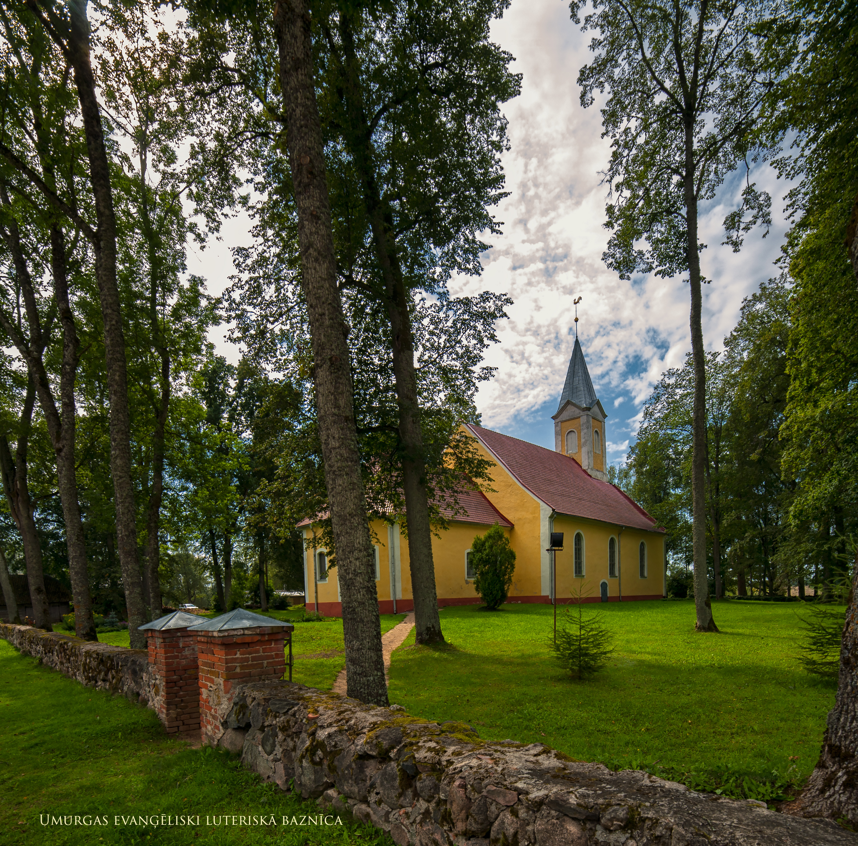 Umurgas luterāņu baznīca ar žogu, Umurga